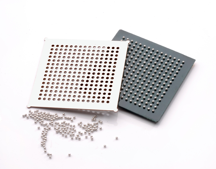 Reballing mit Maske